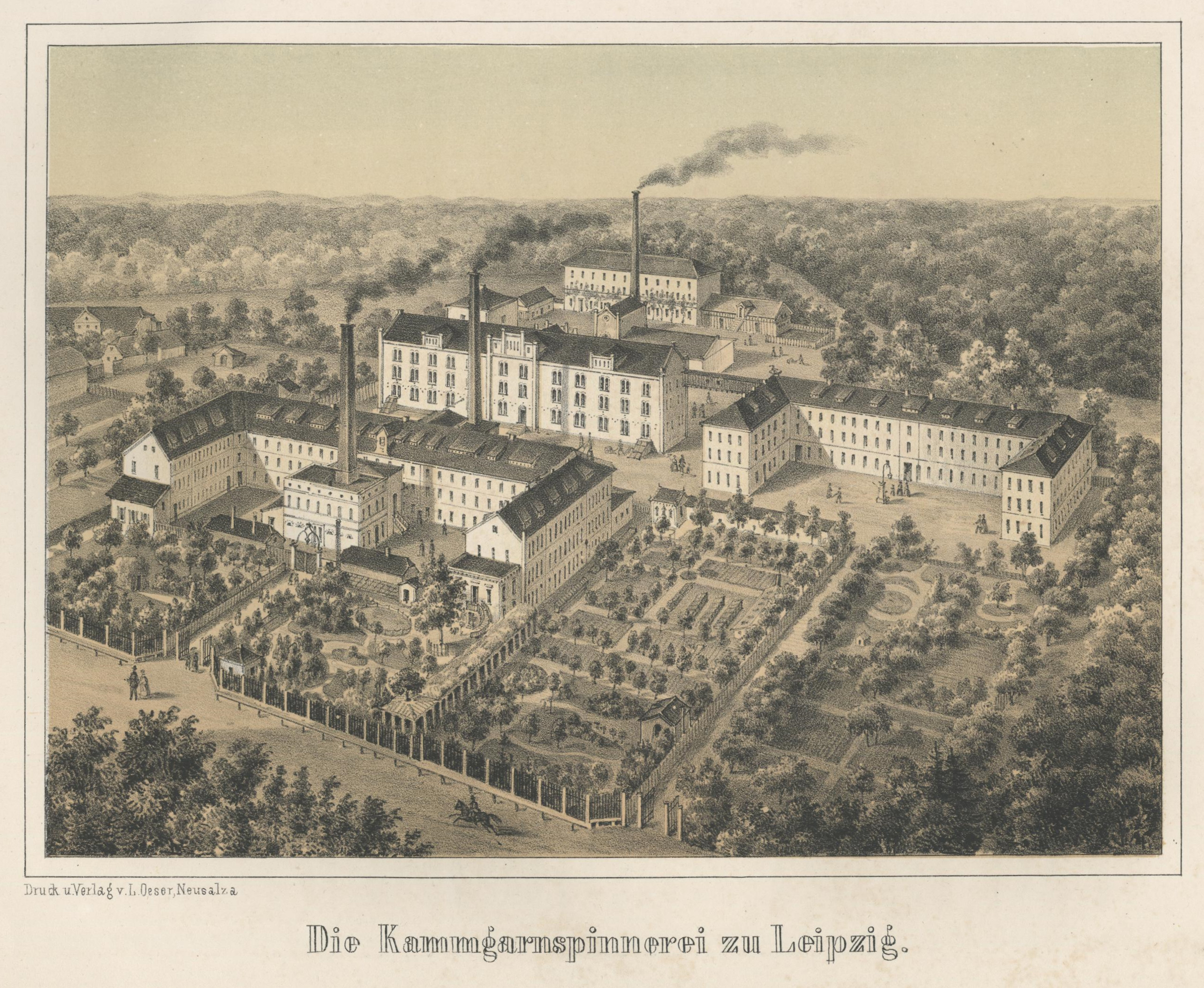 Die Kammgarnspinnerei zu Leipzig aus: Album der Sächsischen Industrie Erster Band